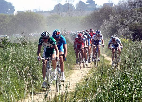 Tratto di un ribinou della Tro Bro Leon